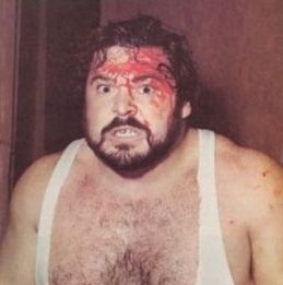 Ivan Putzki en couverture d'un programme de catch de l'America Wrestling Association d'octobre 1974